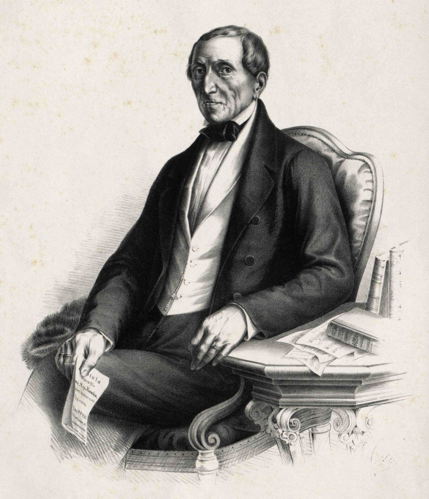 Depicted person: Jan Nepomuk Kaňka mladší